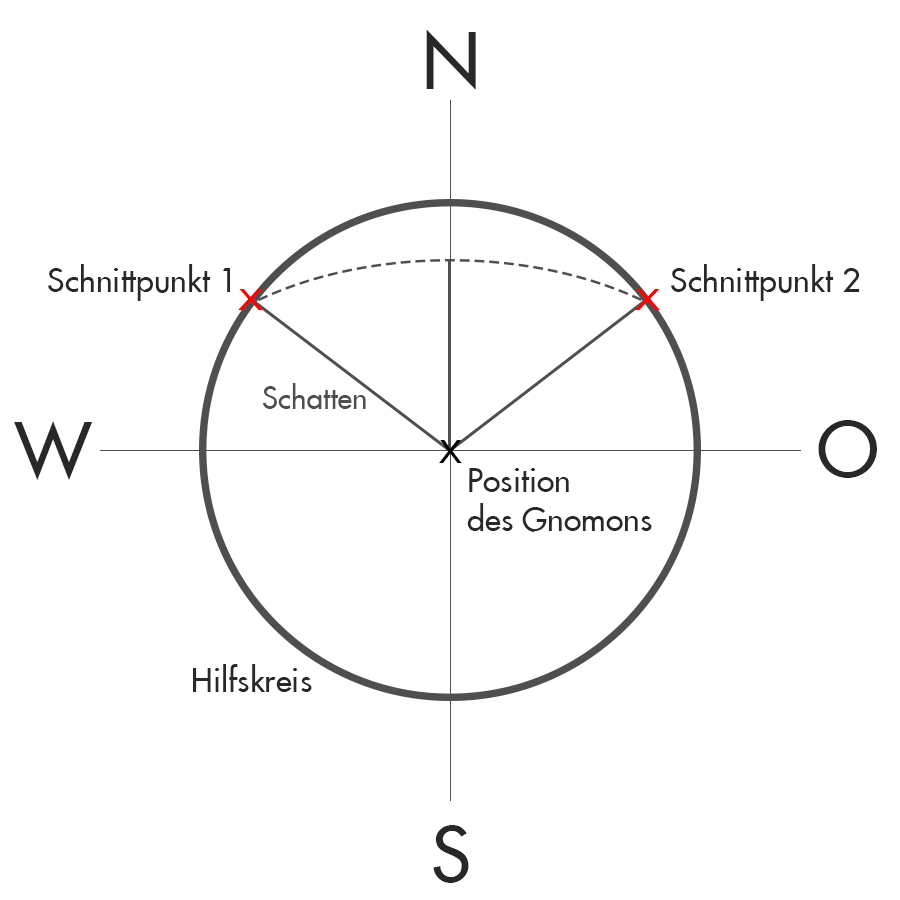 Bestimmen der Nordrichtung mithilfe eines Schattenstabs (Gnomon)